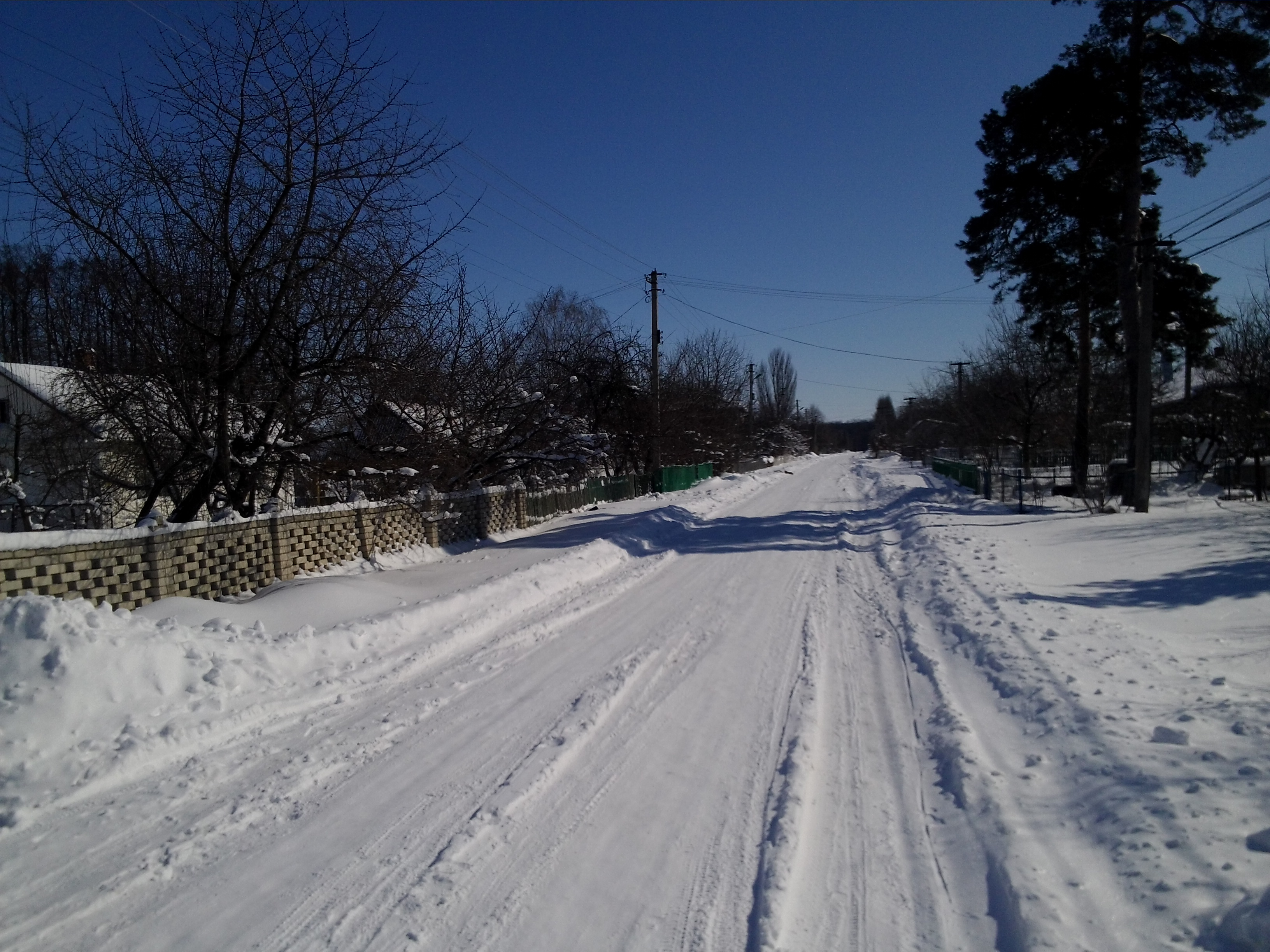 смт. Турбів. Вулиця Пролетарська